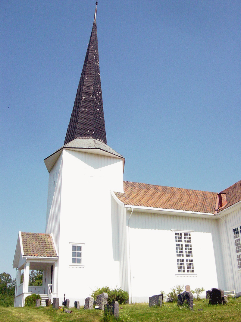 Fluberg kirke, in Søndre Land